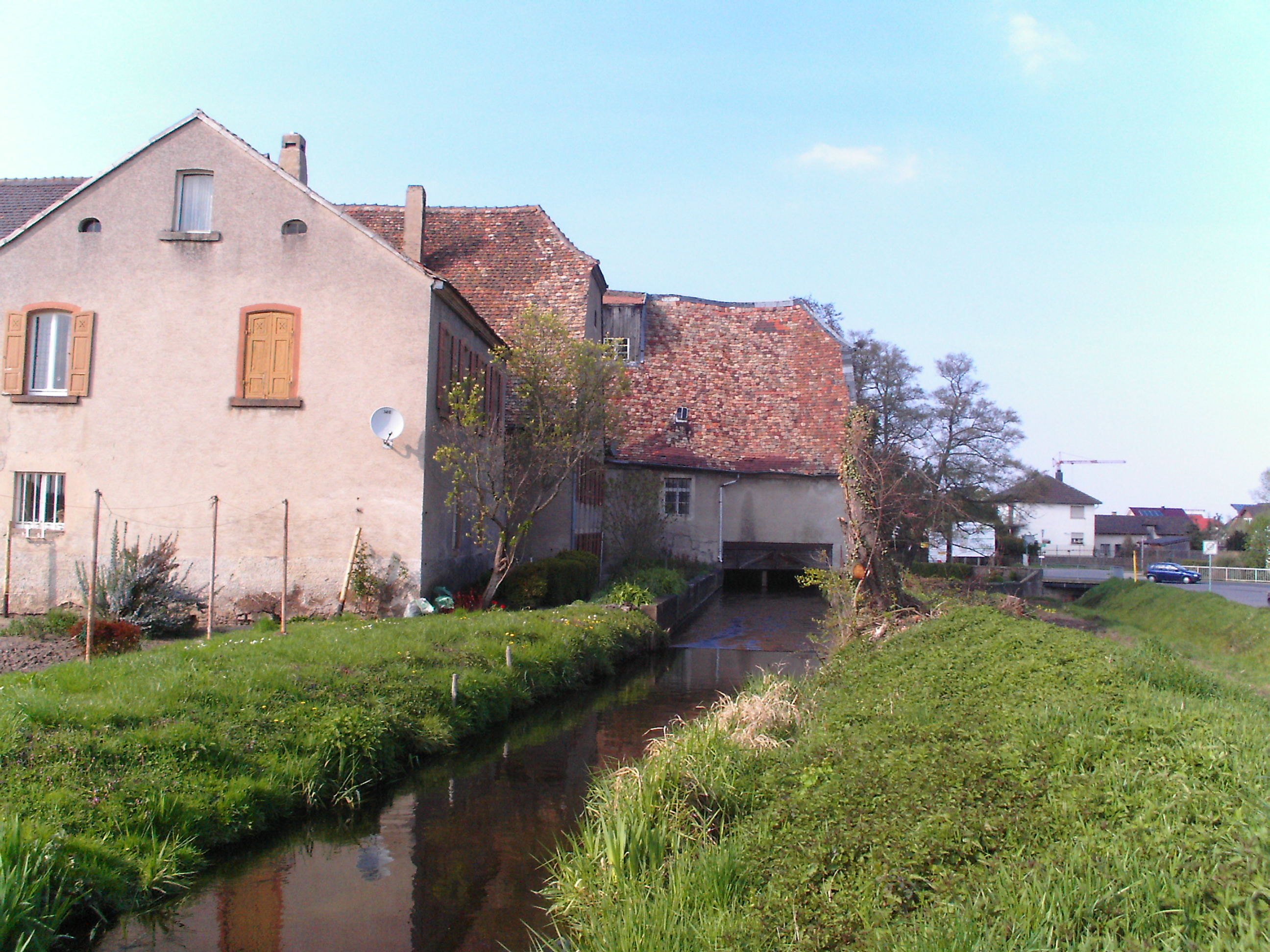 67245 Lambsheim, Pfalz, Deutschland, Dorfmühle.